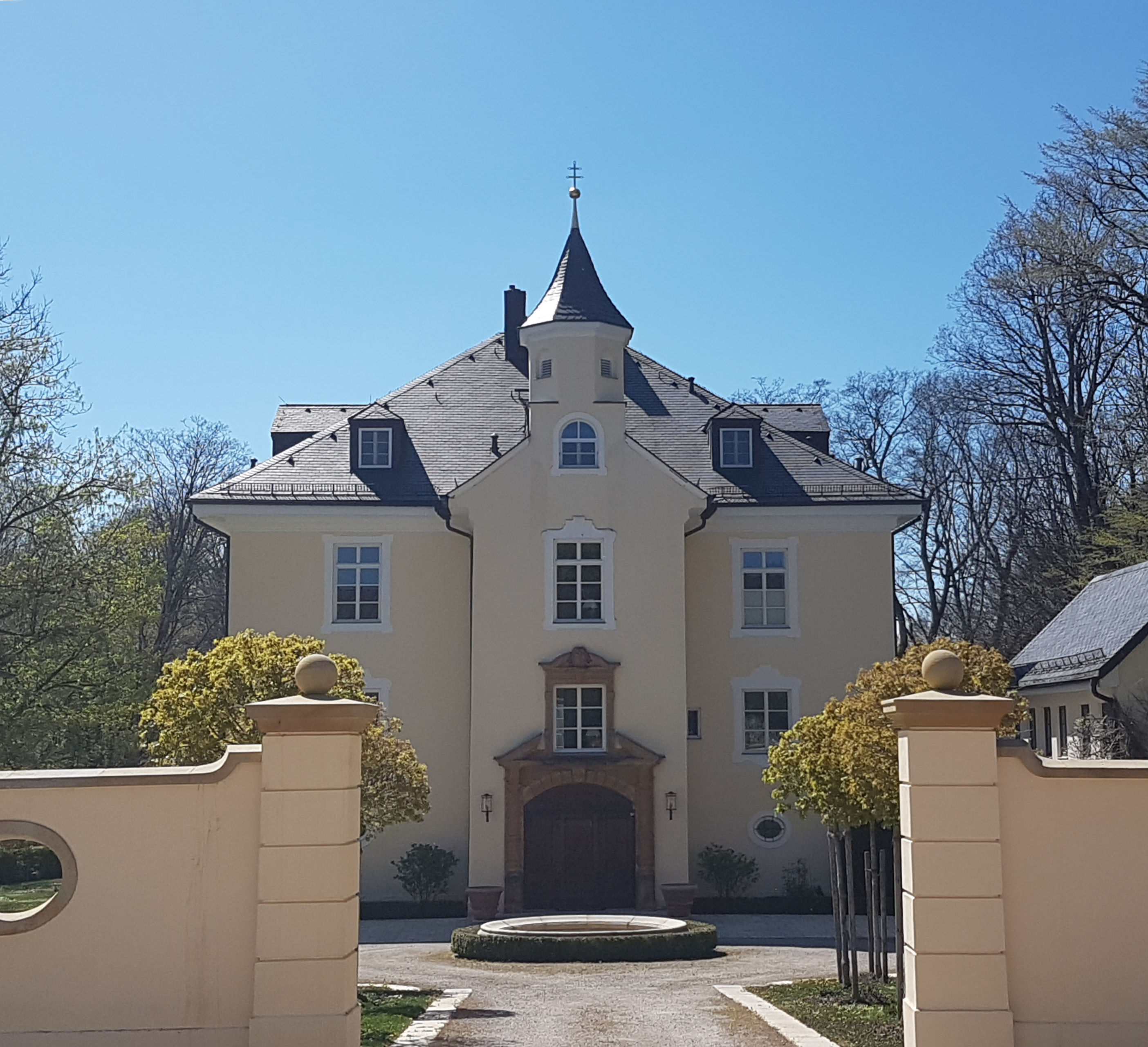 Schloss Falkenberg (Moosach)